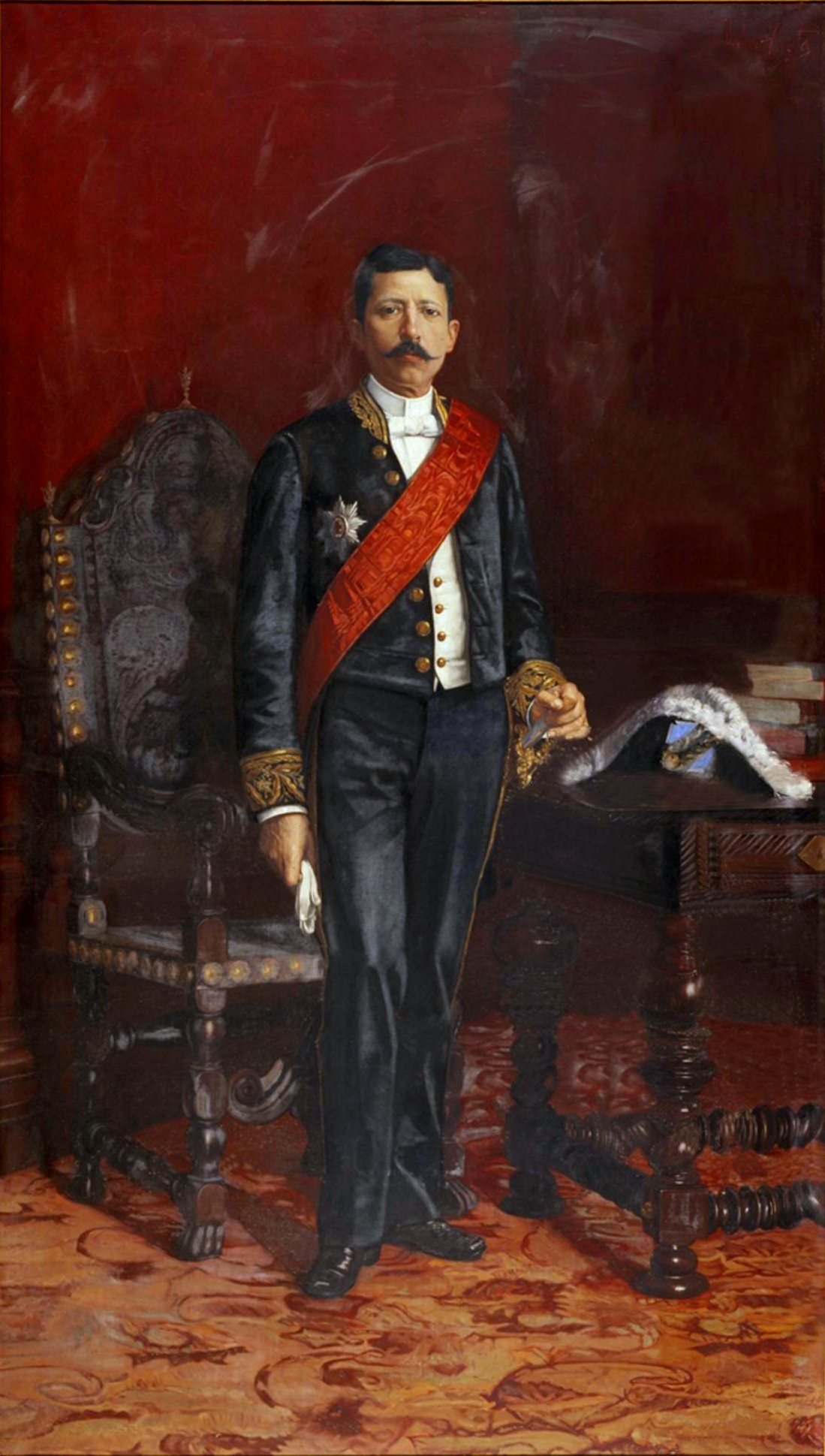 Primeiro-Ministro português João Franco.